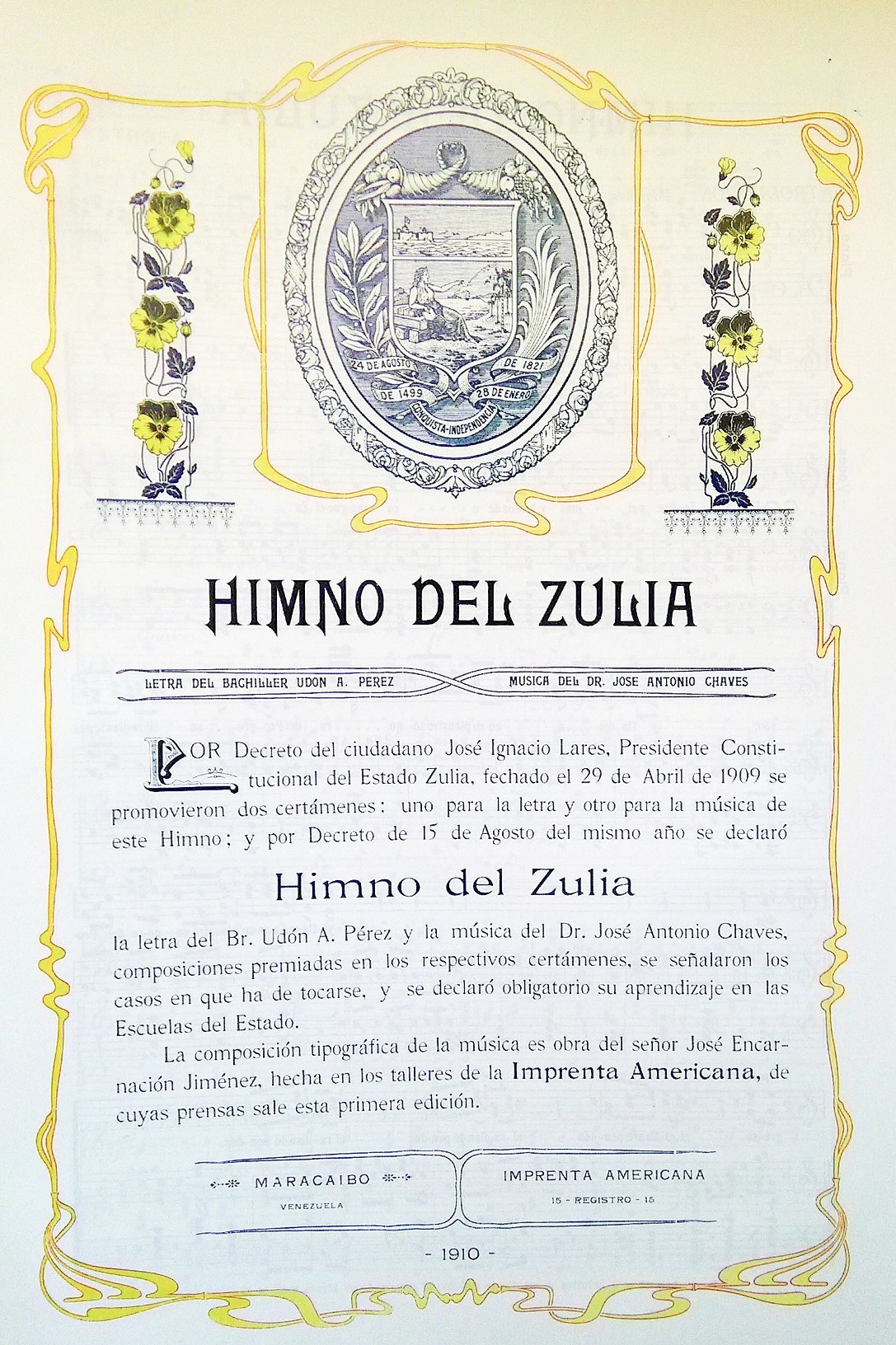 Primer aviso del Himno del Zulia. Publicado por Eduardo López Rivas en su casa editorial "Imprenta Americana"